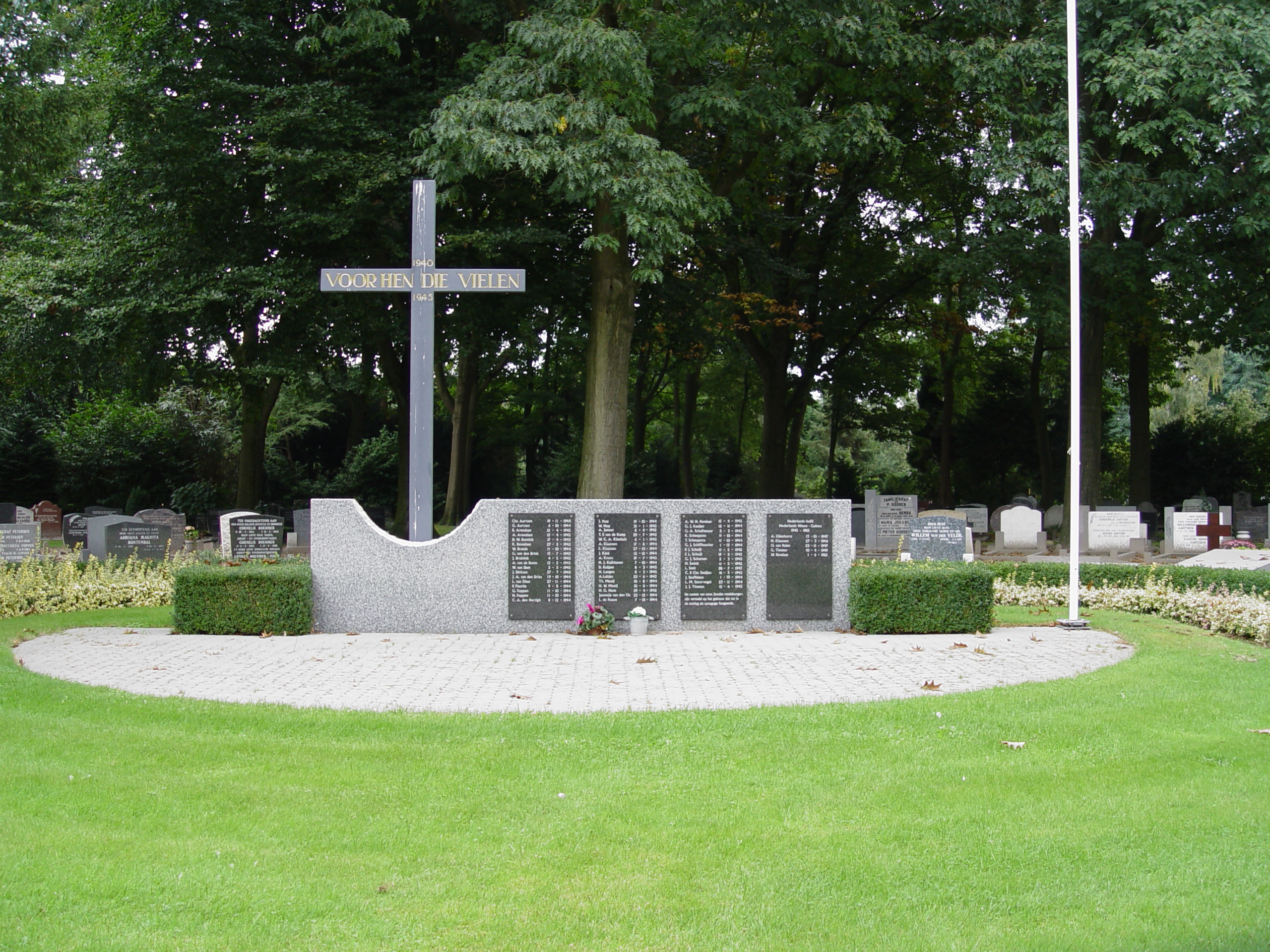 Monument voor de gevallenen